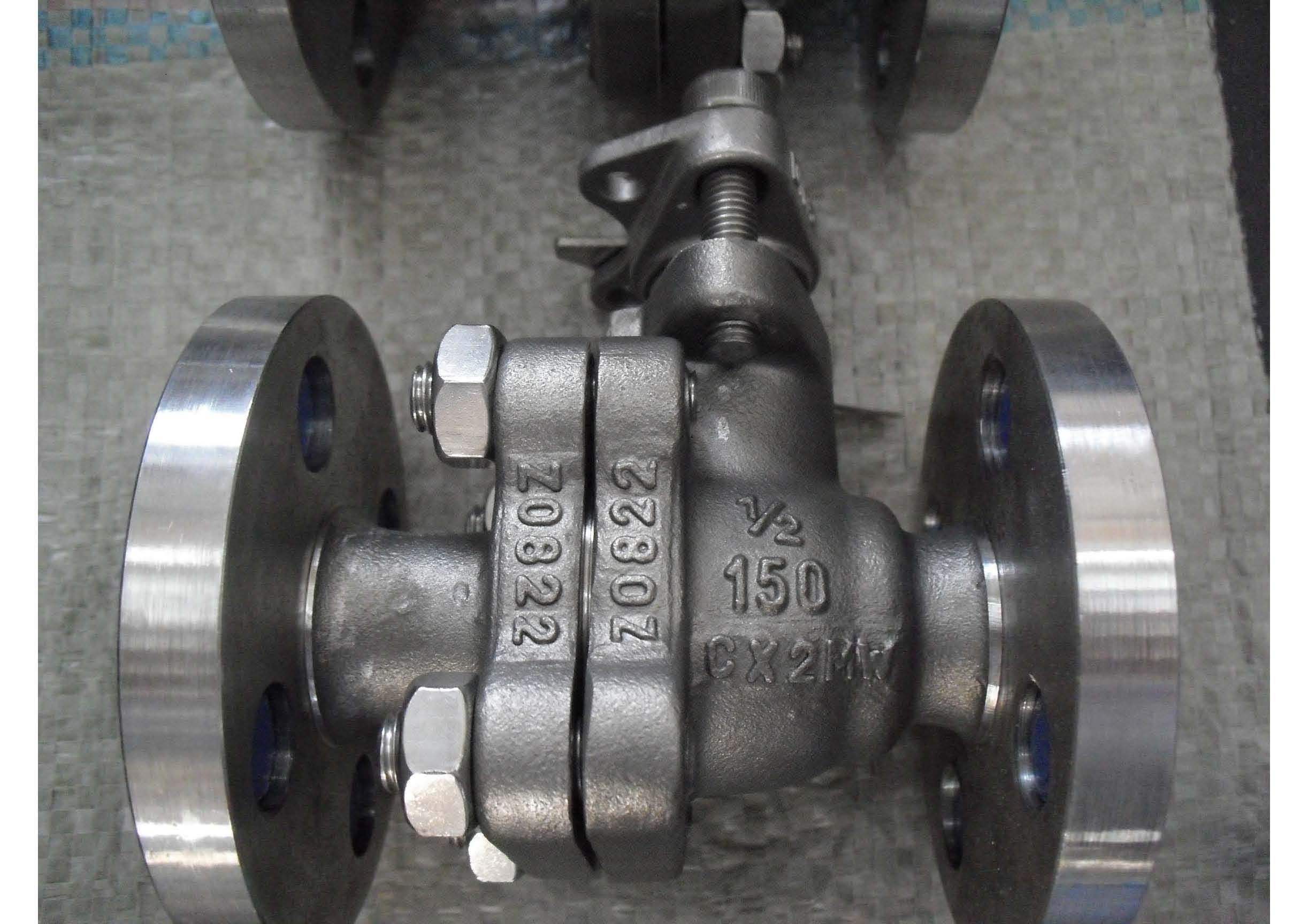 Valvula de bola en Hastelloy C276. Hastelloy es una aleación de niquel, cromo y molibdeno con adicion de tungsteno y contenidos de carbono y silicio extremadamente bajos. Se trata de una versión mejorada de la aleación AMC-4 que manteniendo similar resistencia a la corrosión presenta caracteristicas de conformabilidad considerablemente superiores, que facilitan su puesta en obra para la fabricación de equipos.